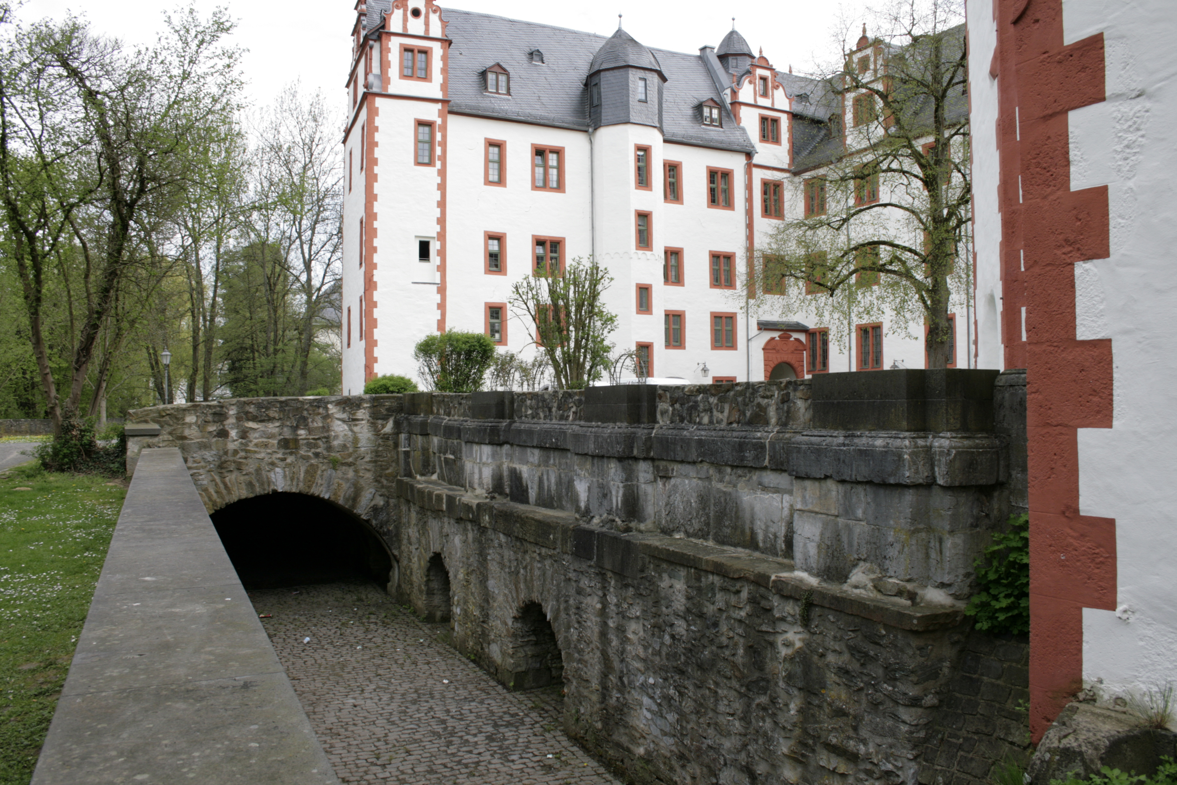 Schloss Hadamar, Grabenrest, Deutschland